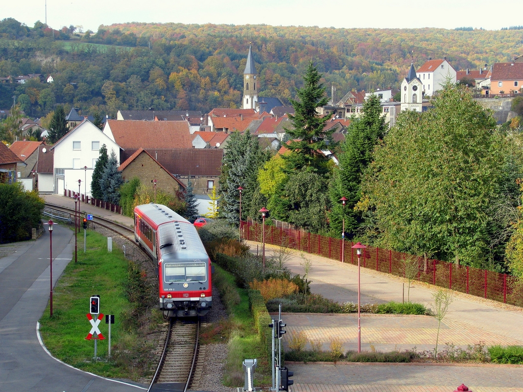 628 458 verlässt gerade Lauterecken und befindet sich auf dem Weg nach Kaiserslautern Hbf